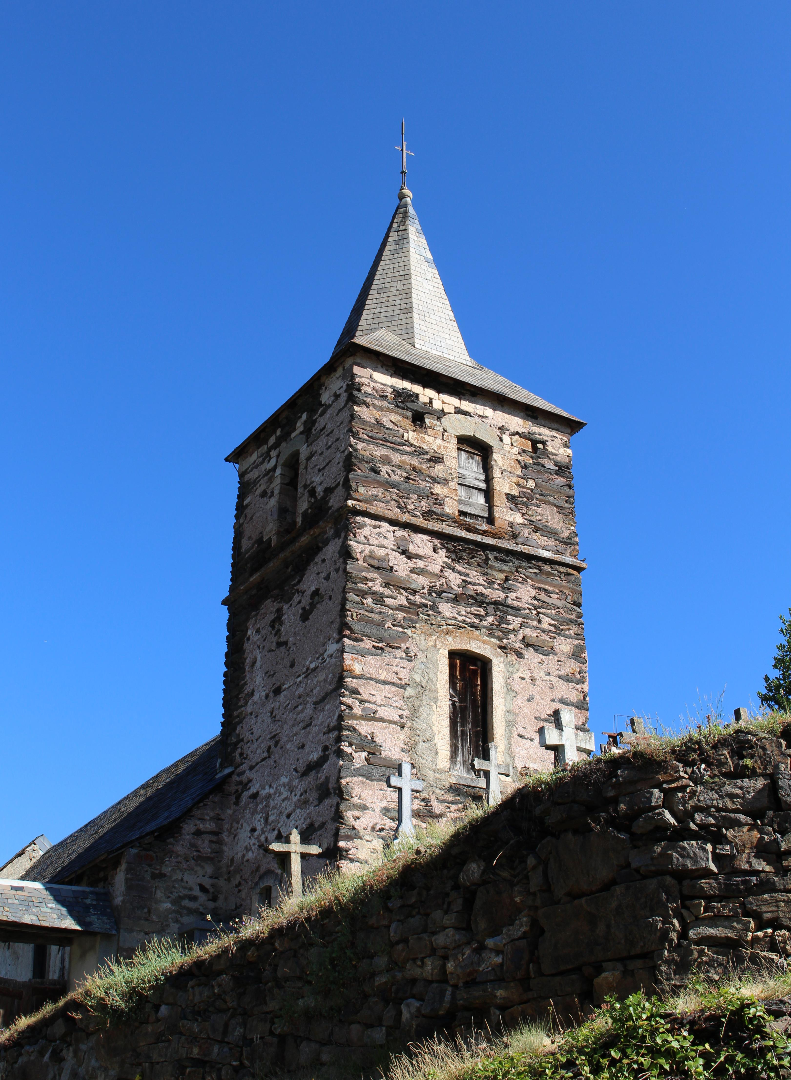 Église Saint-Pierre-aux-Liens d'Ardengost (Hautes-Pyrénées)